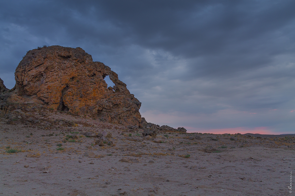 Qarğabazar qayası. Qobustan ərazisində yerləşir.